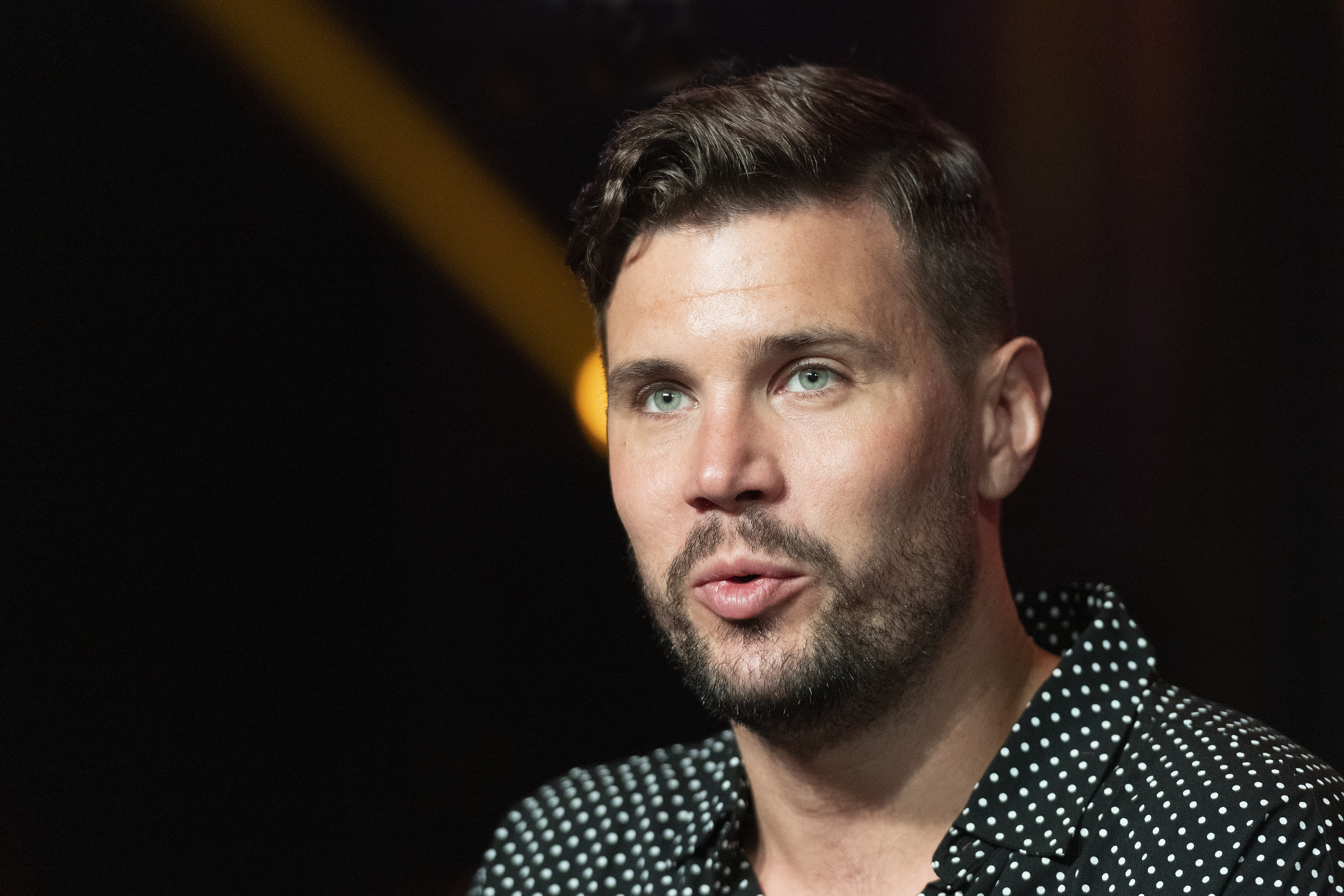 Robin Bengtsson intervjuas inför Mello i Linköping 2020